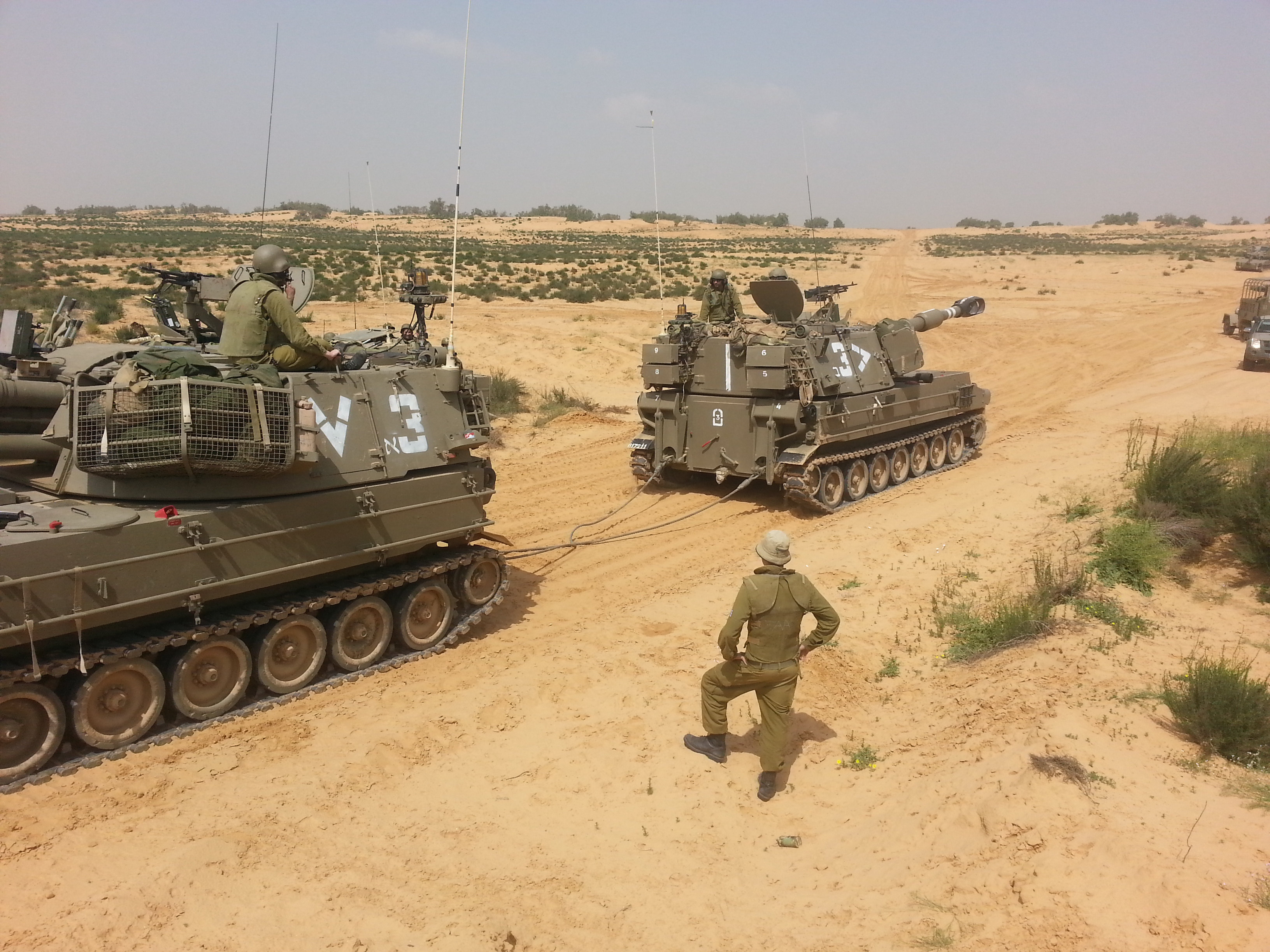 גדוד 9305 באימון